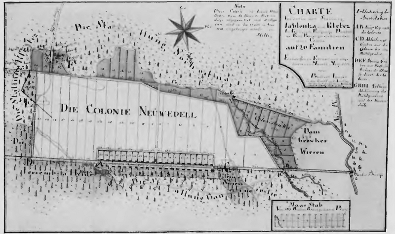 Karte der Kolonie Neuwedel (Neuwedell) in Oberschlesien 1773.